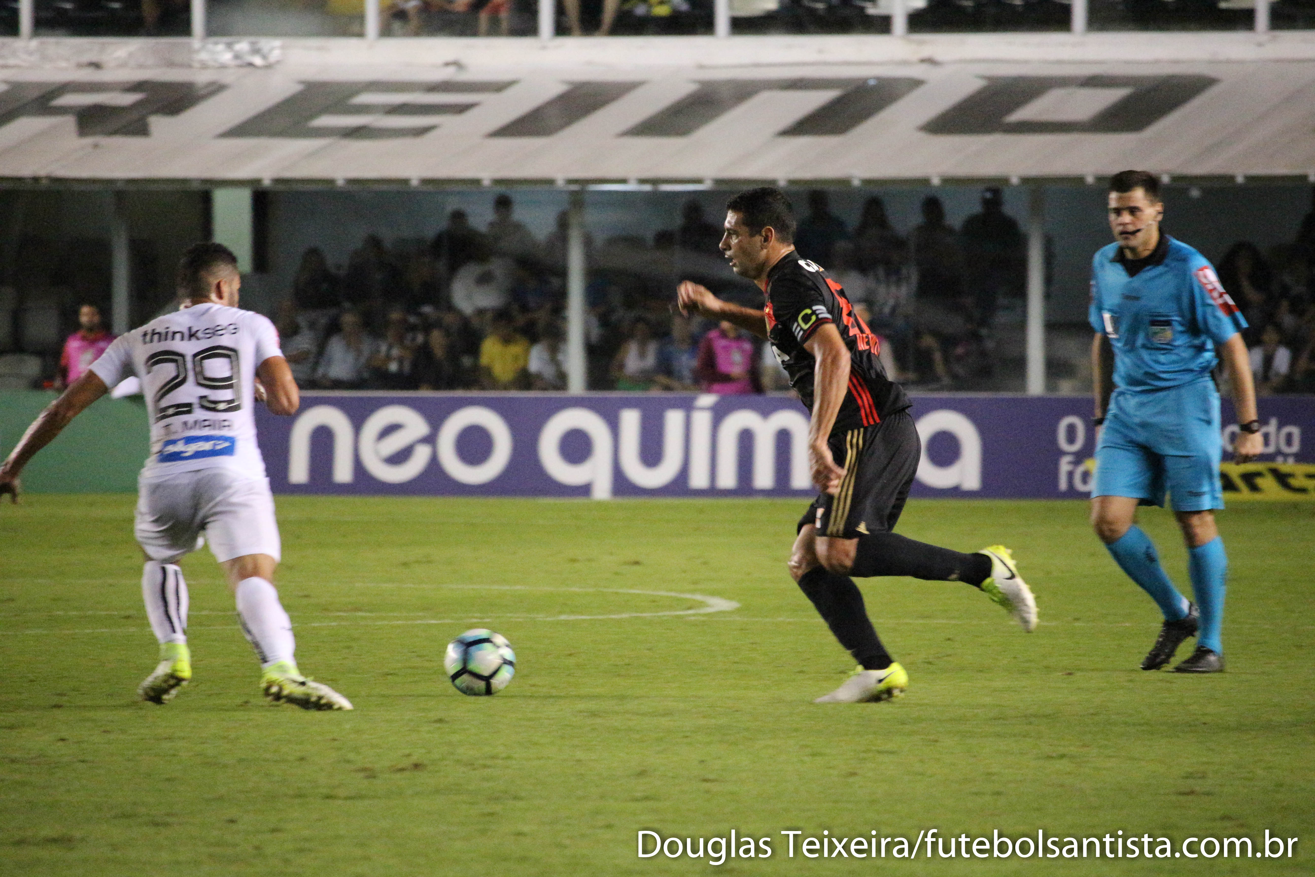 Foto: Douglas Teixeira/Futebol Santista